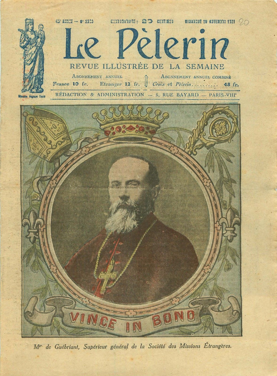 Le Pèlerin, n° du 25 novembre 1921. Couverture avec la photographie de Mgr de Guébriant, supérieur des Missions étrangères de Paris. Devise "Vince in Bono"